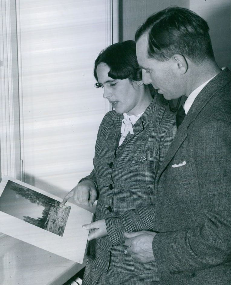 Ulla Bodorff (1913-1982), svensk trädgårdsarkitekt. Här tillsammans med den brittiske trädgårdsarkitekten Frank Clark, föreståndare för den hortikulturavdelningen vid universitetet i Reading.